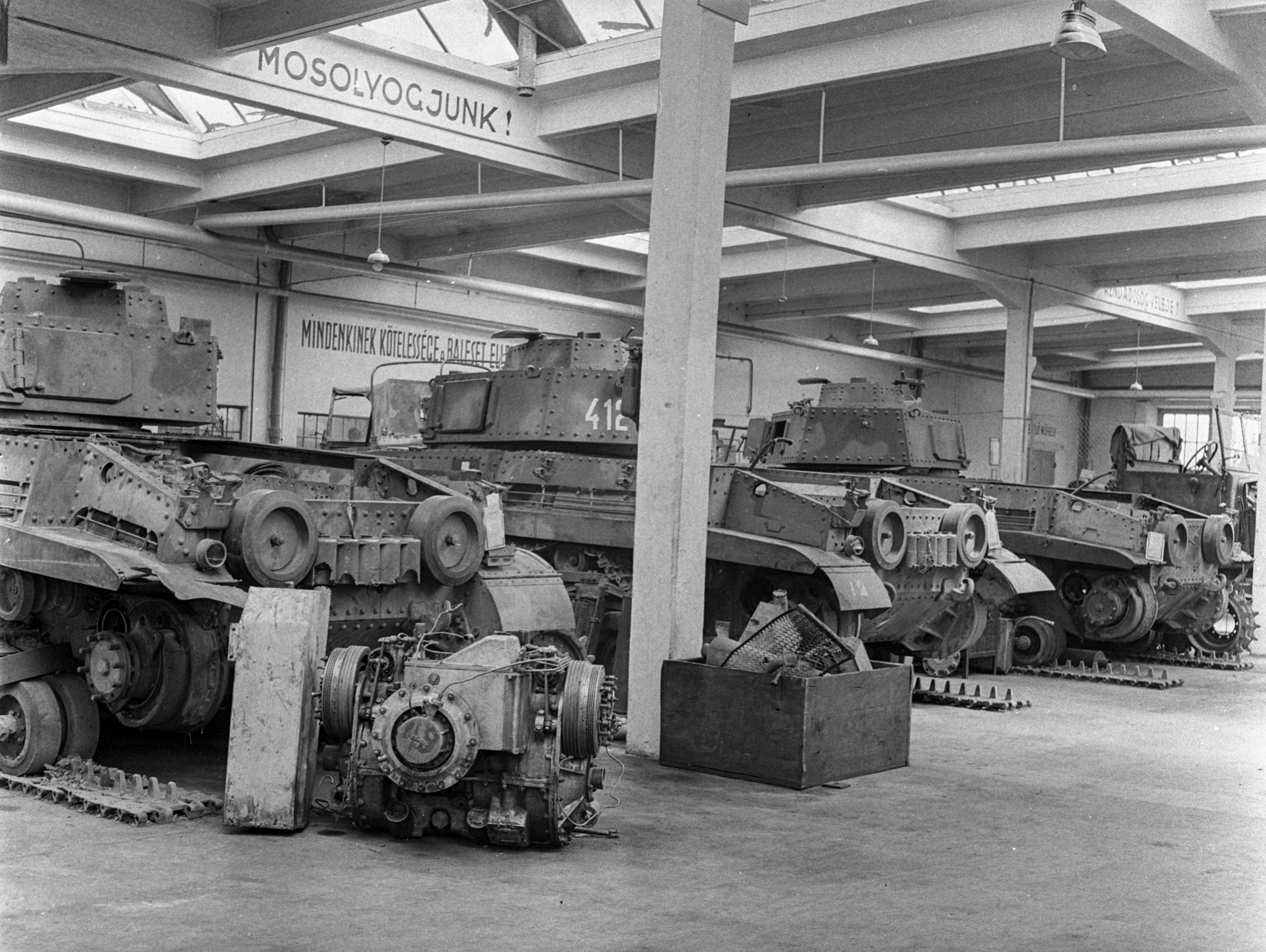 Mátyásföld, Újszász utca 41-43. Magyar Királyi Honvéd gépkocsiszertár, javító műhely. Location: Hungary, Budapest XVI. Tags: tank, Hungarian brand, track, workshop, military, engine, Budapest Title: Mátyásföld, Újszász utca 41-43. Magyar Királyi Honvéd gépkocsiszertár, javító műhely.